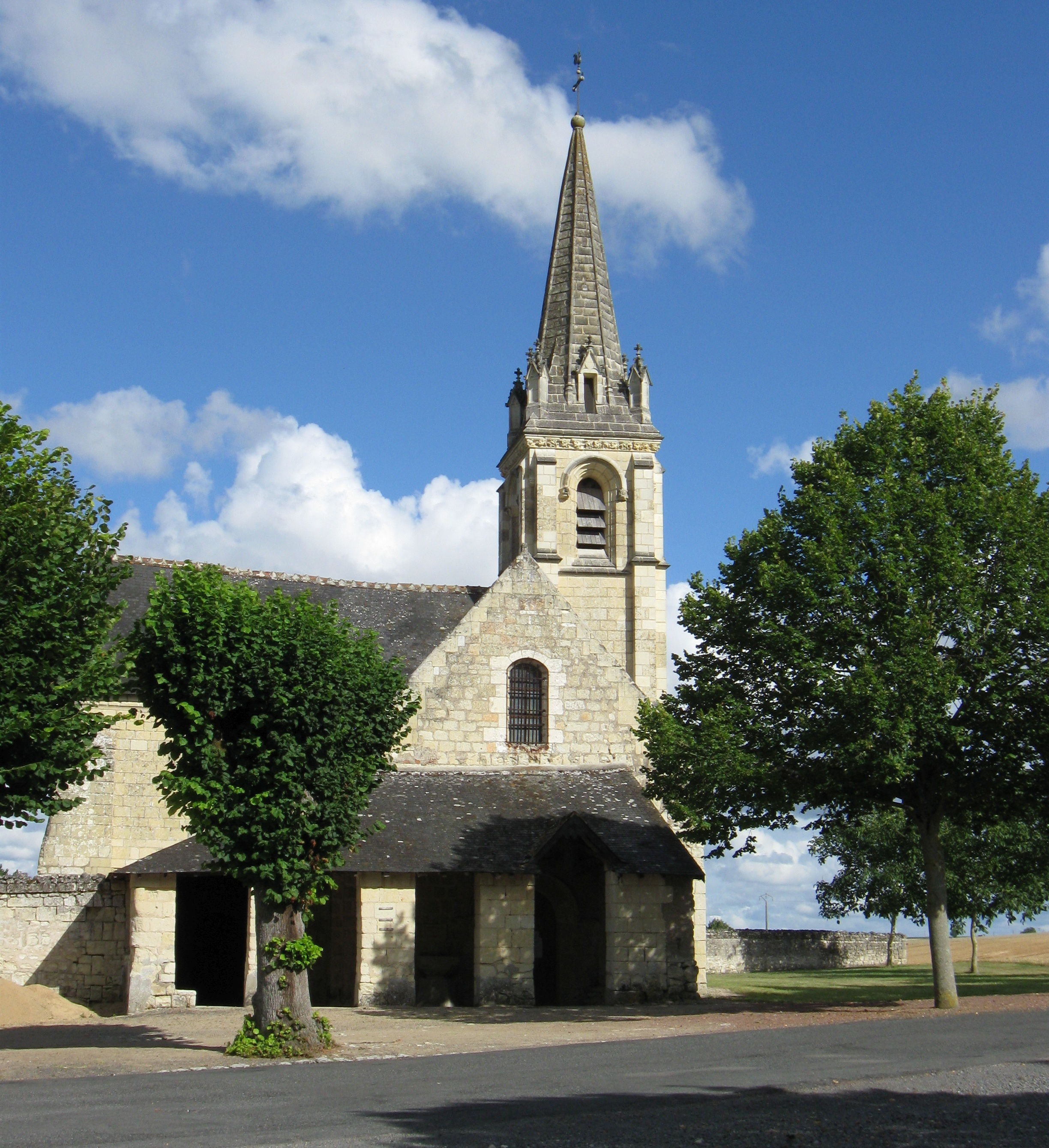 Église Saint-Martin de La Roche-Clermault et son caquetoire. (Indre-et-Loire, région Centre-Val de Loire).